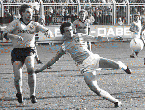 Title: Fußball-Pokal, FC Karl-Marx-Stadt - Dynamo Dresden 2:1 People in the image: Döschner, Matthias (Fußballspieler), DDR * Trautmann, Andreas (Fußballspieler, Sportgemeinschaft Dynamo Dresden), DDR Factual corrections and alternative descriptions are encouraged separately from the original description. Additionally errors can be reported at this page to inform the Bundesarchiv. Original historic description: ADN-ZB-Thieme- 29.10.88-Karl-Marx-Stadt: Fußball-FDGB-Pokal- FC Karl-Marx-Stadt - Dynamo Dresden 2:1 n.V. (1:1), (1:1)- Hier kann sich der Karl-Marx-Städter Gerd Seifert (M.) gegen die Dynamospieler Matthias Döschner und Andreas Trautmann (r.) durchsetzen.